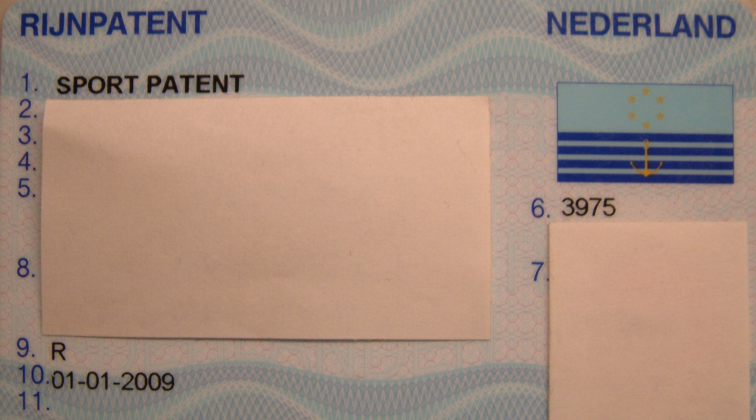 Sportpatent voor de Rijn, voorkant Categorie:Binnenvaart